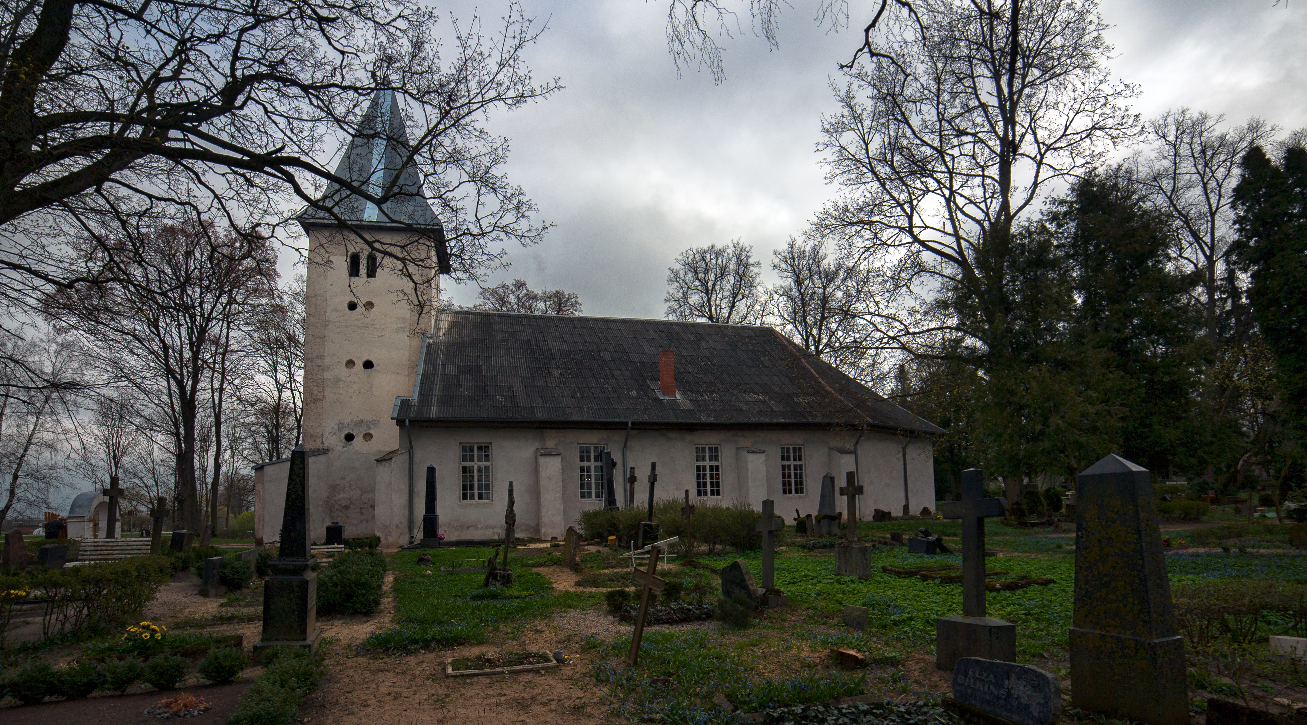 Lielvircavas luterāņu baznīca, Lielvircava